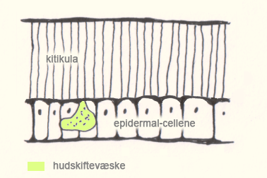 Hudskifte prosessen hos leddyr - NORSK TEKST